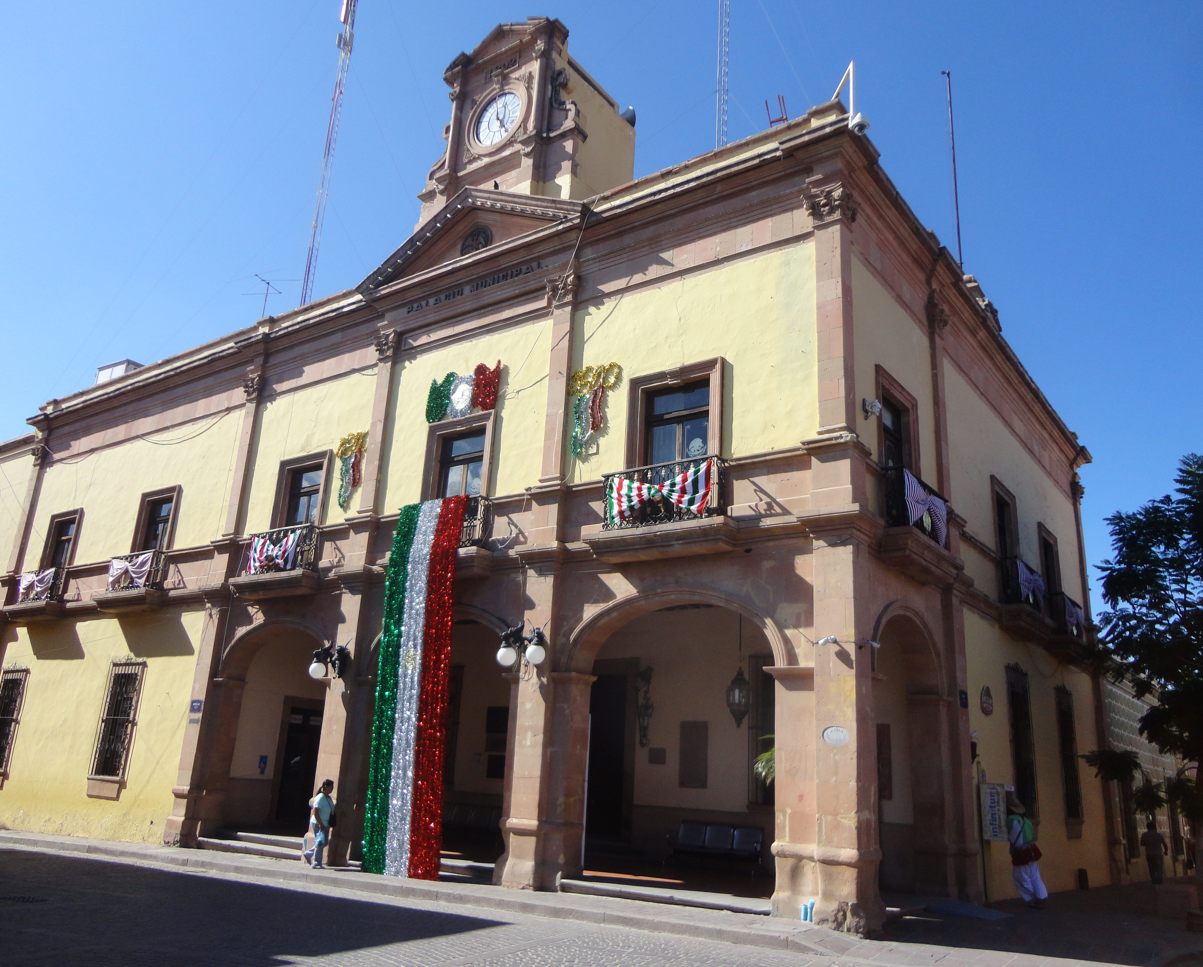 Presidencia Municipal de San Luis de la Paz, Guanajuato, México.